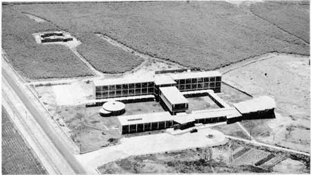 Vista aérea de la FAUA en la década de los 50